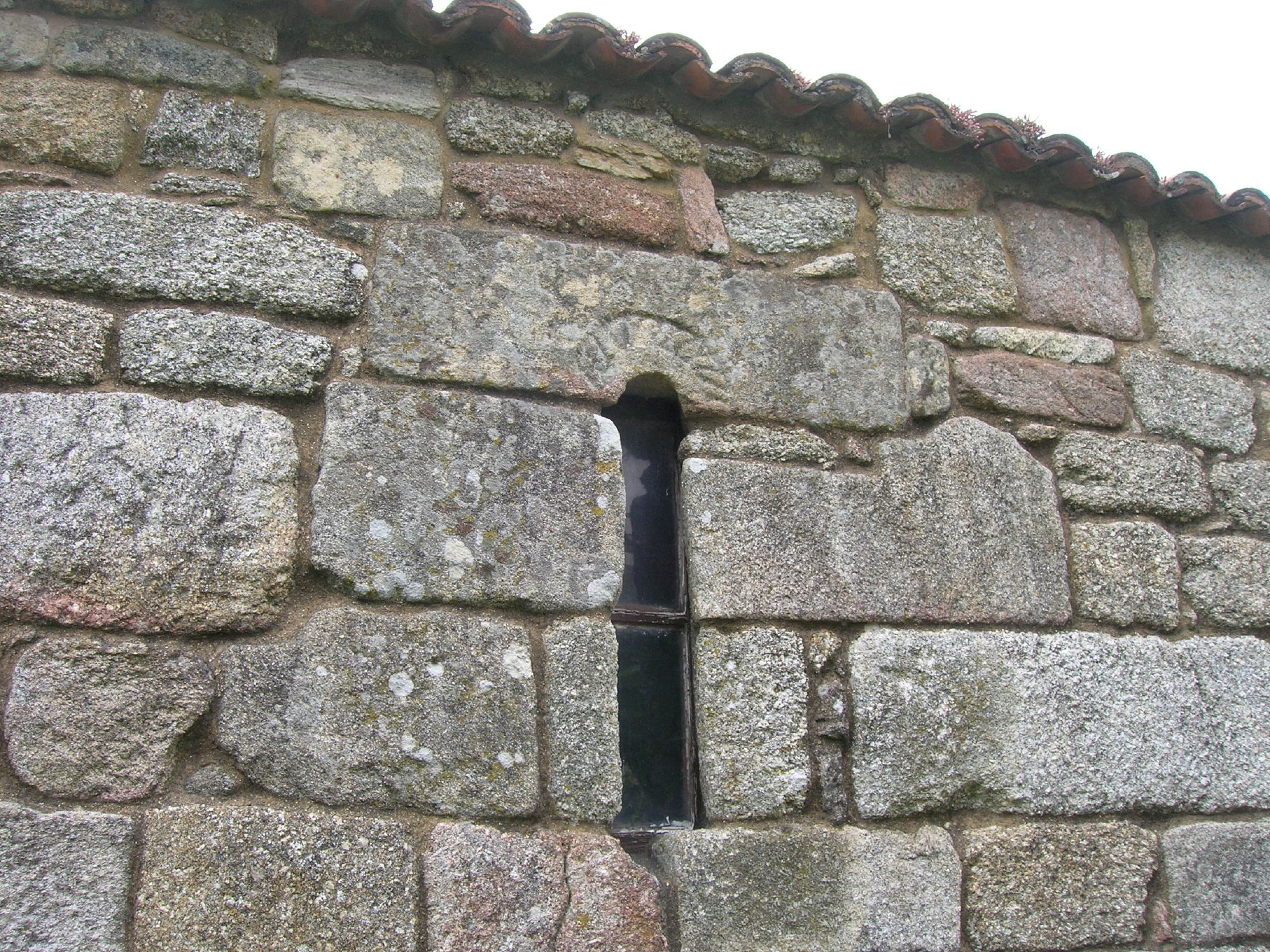 Saetera en el muro sur da Capela de San Xés de Francelos